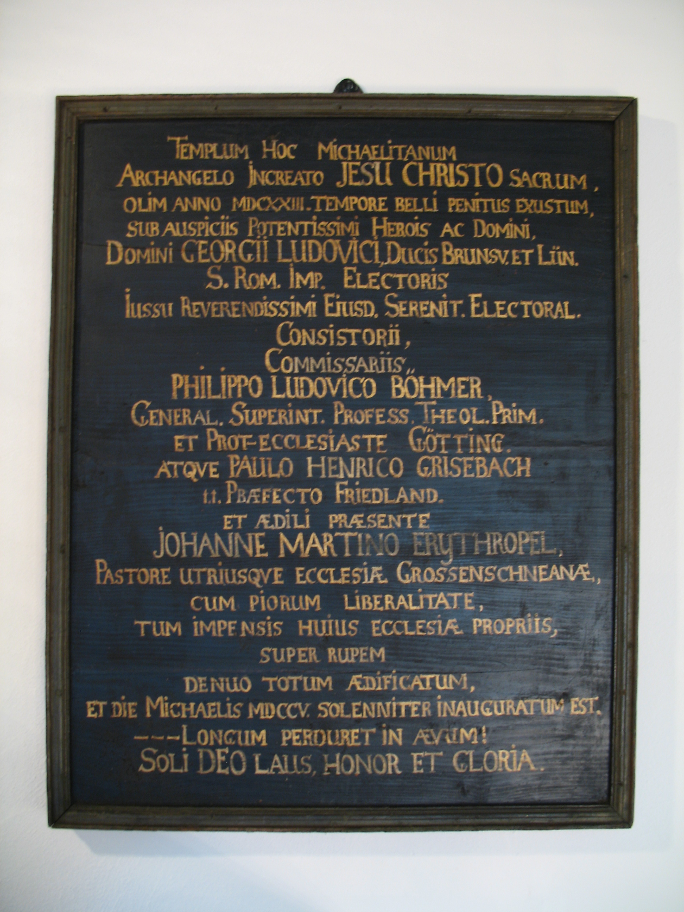 Tafel in der Kirche von Groß Schneen, Landkreis Göttingen, Niedersachsen